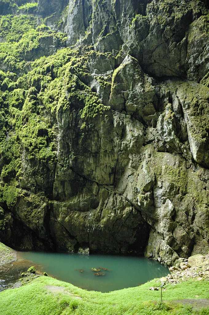 Horní macošské jezírko